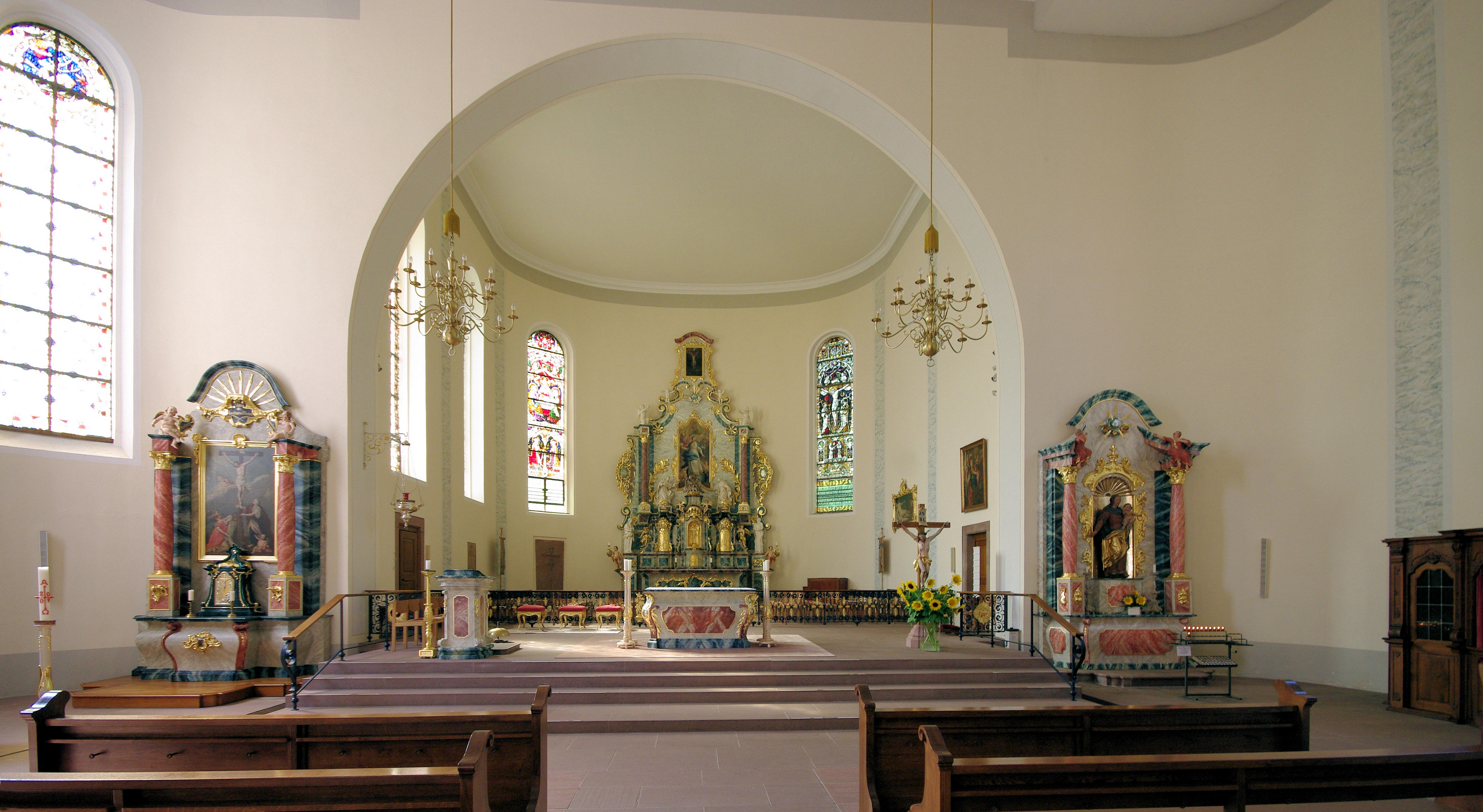 Liebfrauenkirche